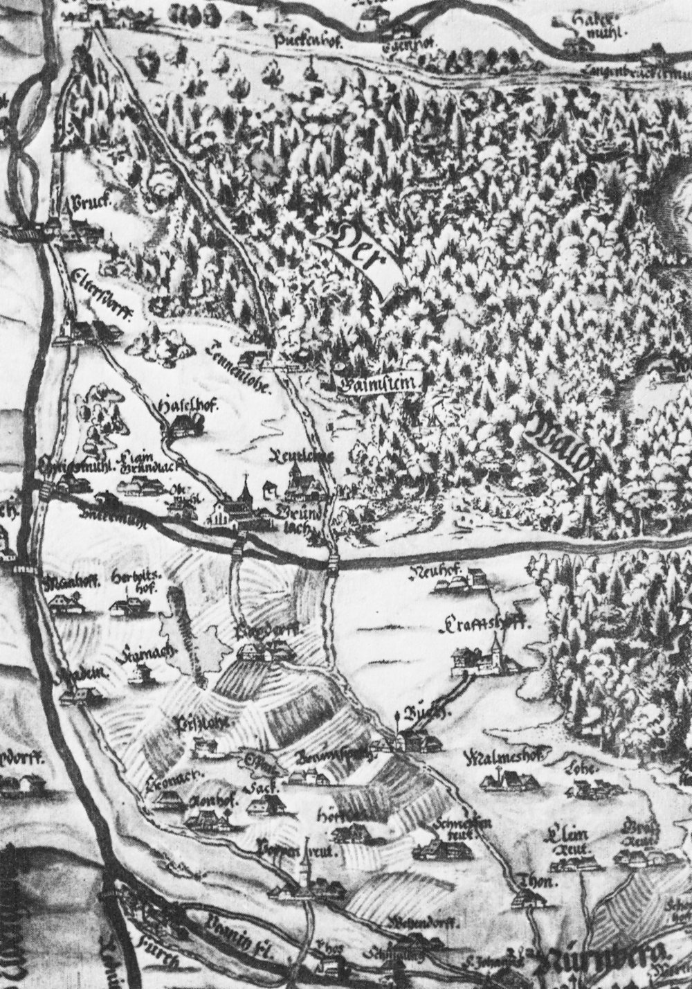 Ausschnitt aus der Großen Wald- und Fraißkarte Das Nürnberger Gebiet bis an die Grenzwasser. Schwarzweißabbildung einer 1623 von Johannes Müllner kolorierten Karte auf der Grundlage eines 1563 angefertigten Kupferstichs von Jörg Nöttelein. Das Bild zeigt unter anderem das Knoblauchsland und den Sebalder Reichswald, die zu Nürnberg gehörten.